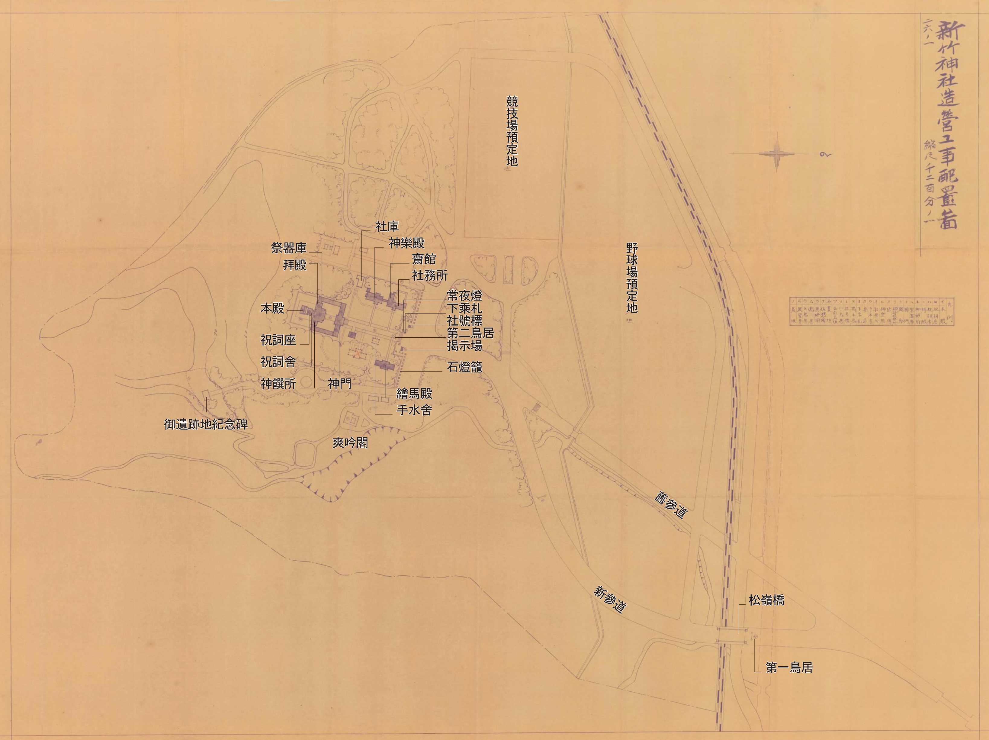 中文（台灣）: 第二代新竹神社配置圖，包含參道、神社設施、爽吟閣及牛埔山御露營地之紀念碑